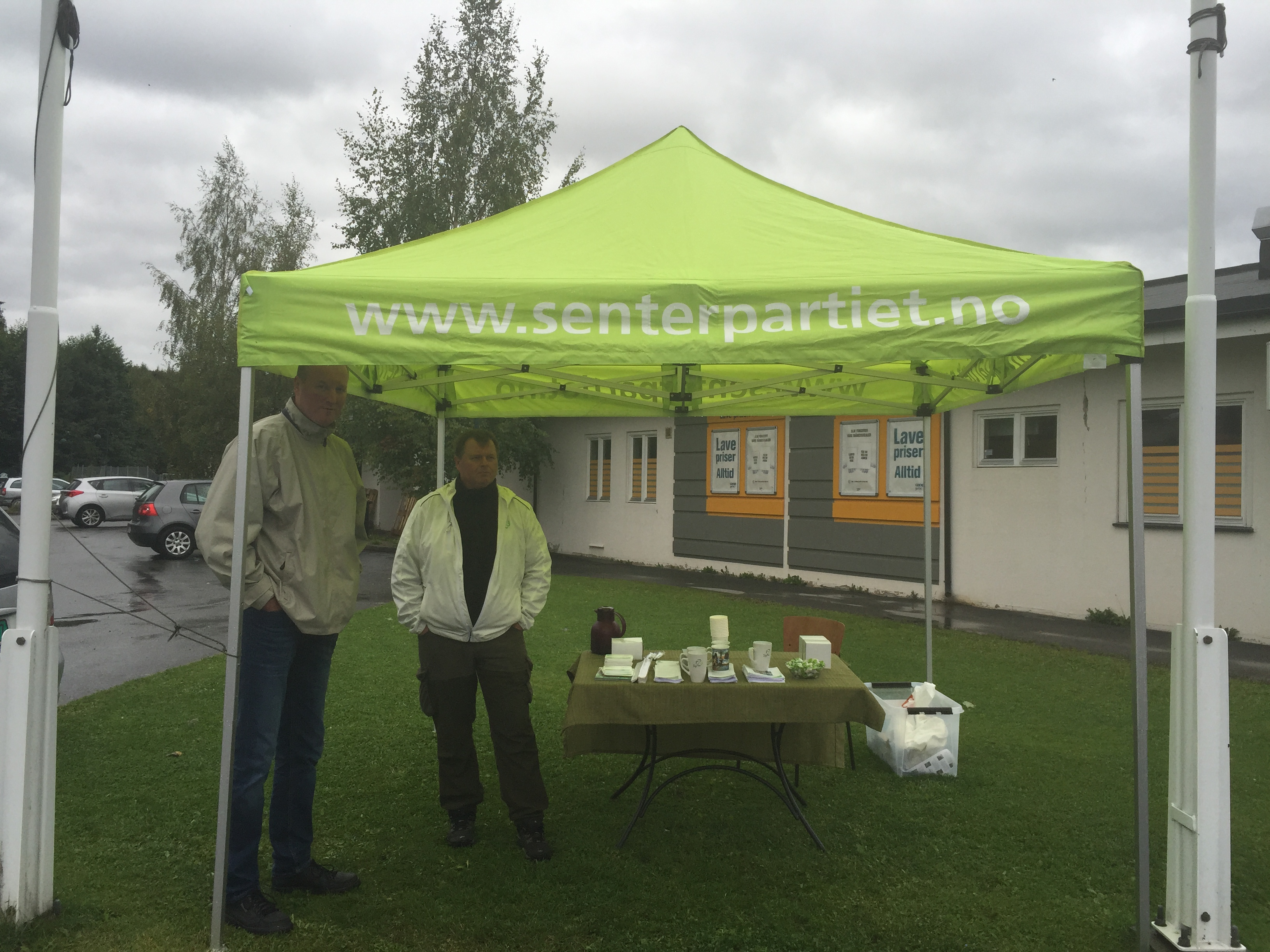 Valgkampstand for Gjøvik Senterparti